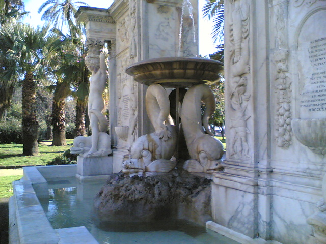 Fontana di Santa Lucia, di Michelangelo Naccherino, a Napoli